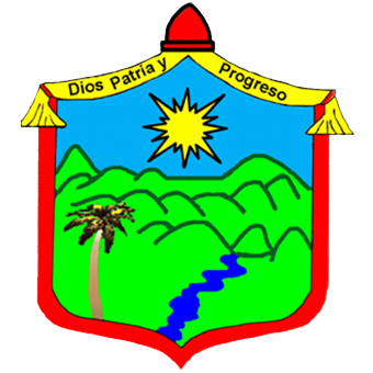 Este es el Escudo del Municipio de Medina tal y como aparece en la página oficial